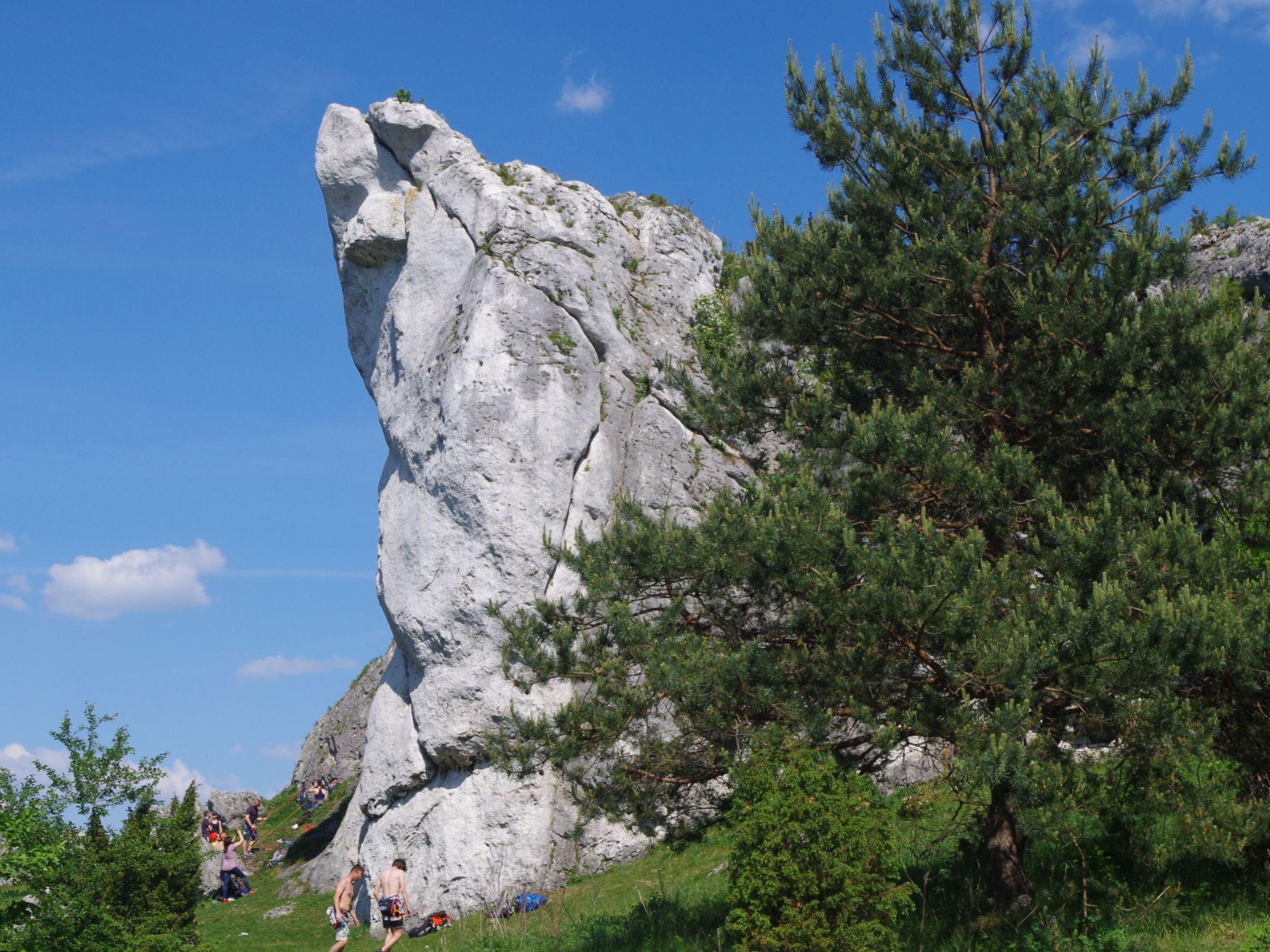 Skała Dziewica w Grupie Dziewicy na wzgórzu Cegielnia koło Olsztyna